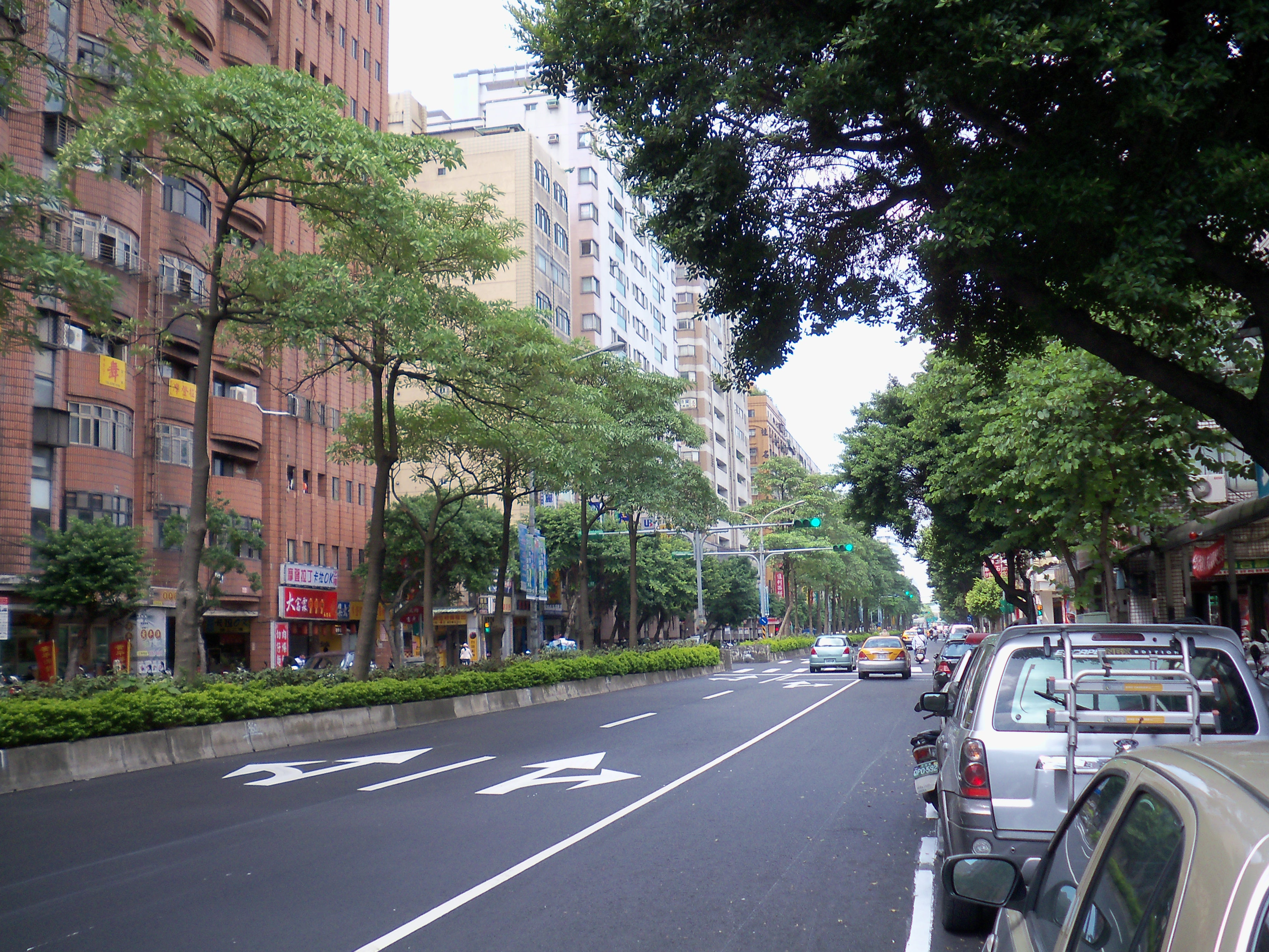 中文（台灣）: 臺北市信義區永吉路。